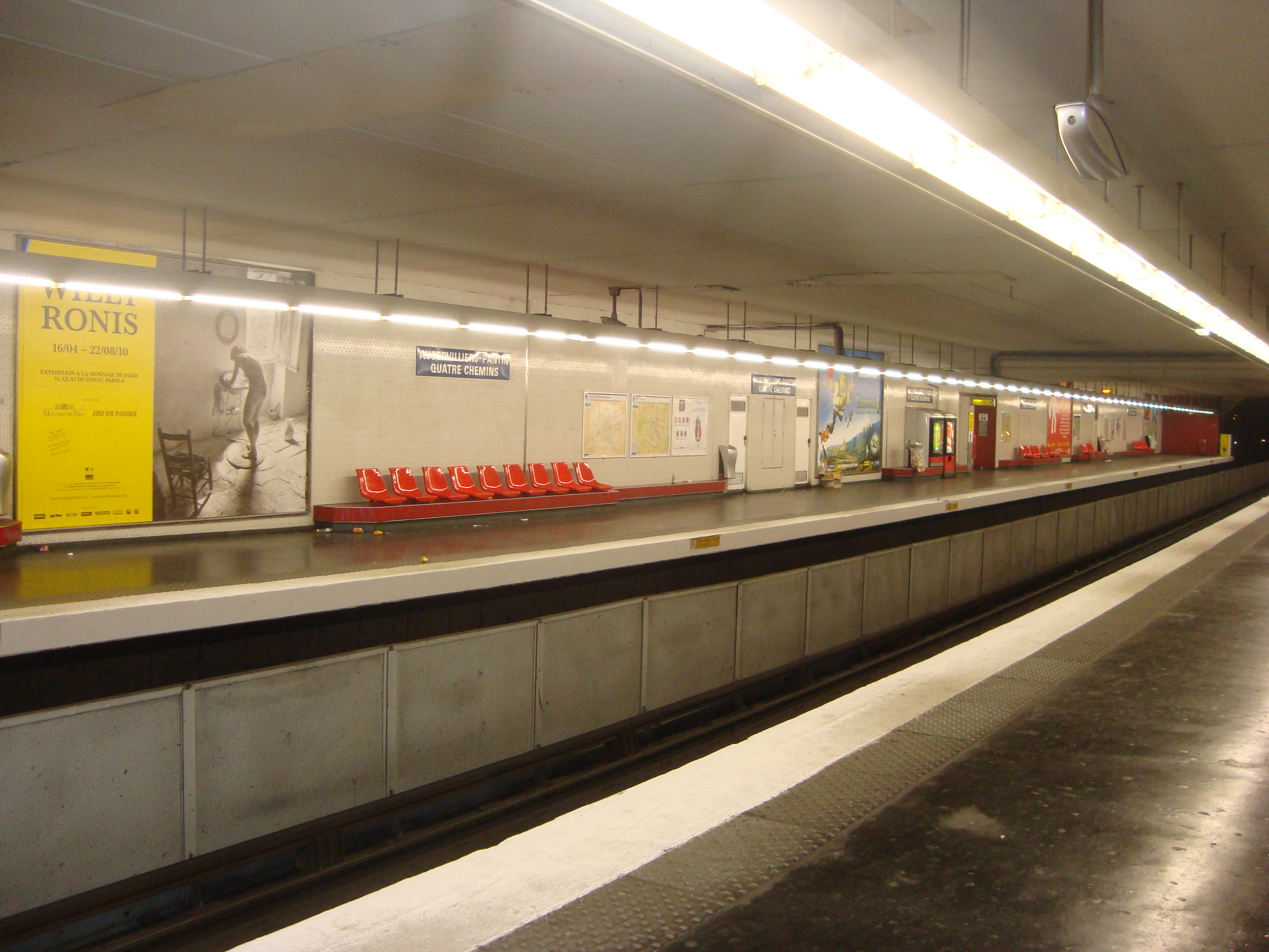 Quais de la station Quatre Chemins sur la ligne 7 du métro de Paris.